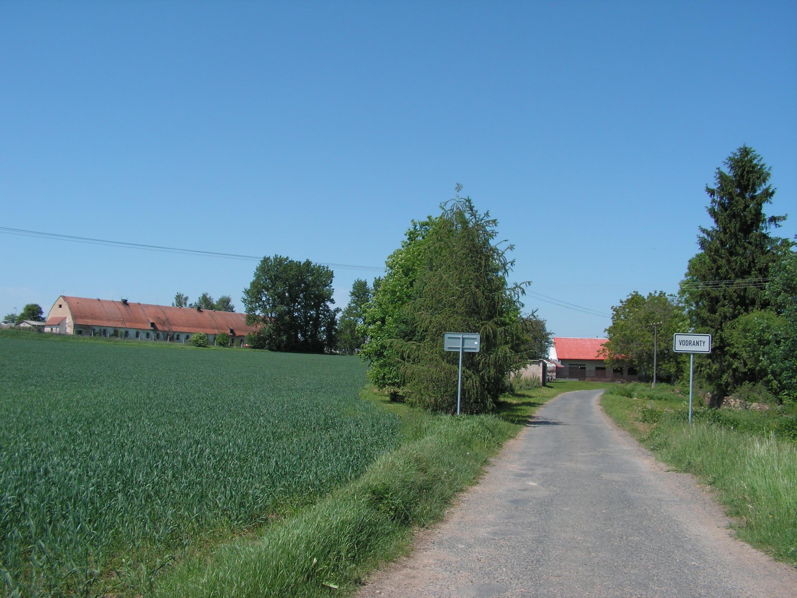 Obec Vodranty v okrese Kutná Hora. Pohled od jihu.